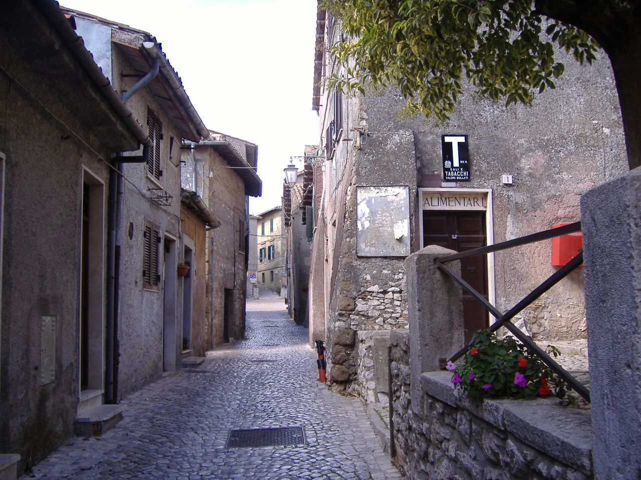 Via di Castel San Pietro Romano nel lazio